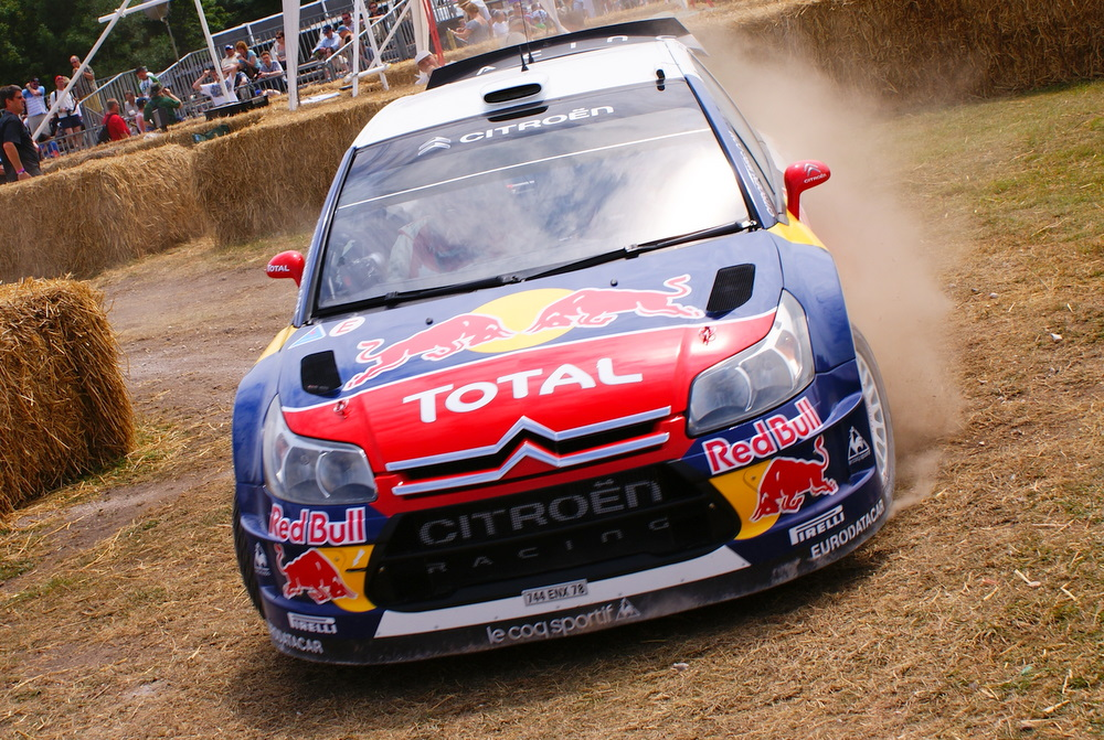 Sébastien Loeb dans la Citroën C4 WRC